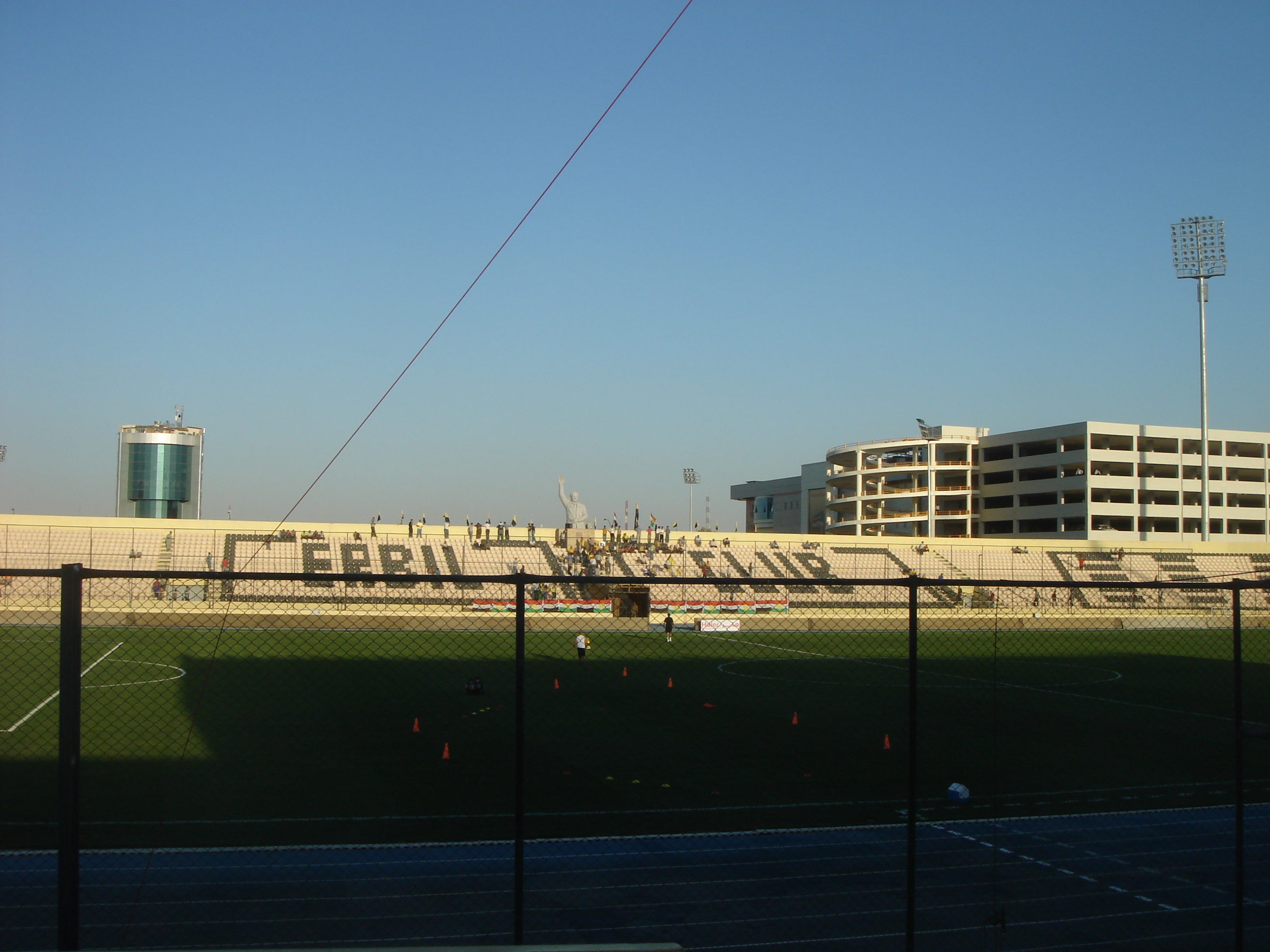 ملعب فرانسو حريري بمدينة أربيل